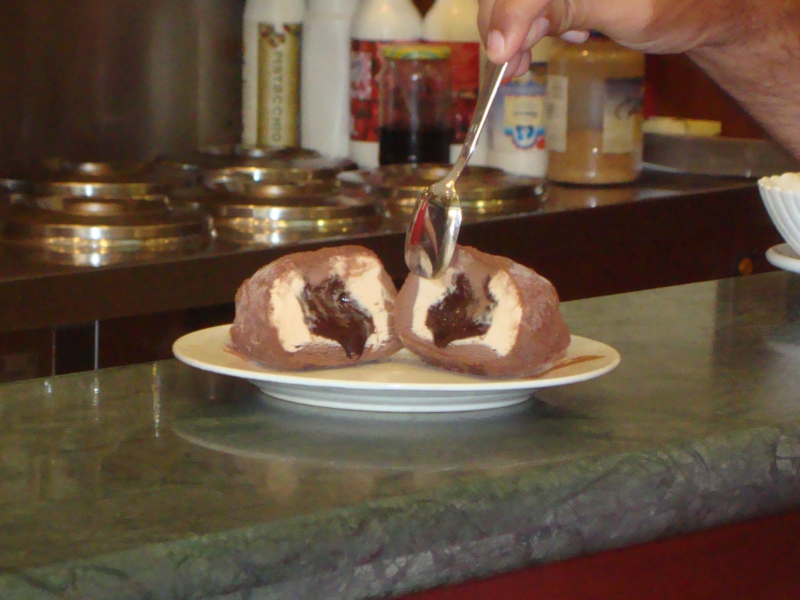 Il Tartufo di Pizzo prodotto dalla Gelateria Ercole dal 1965 - INFO: o visitare pagina Facebook